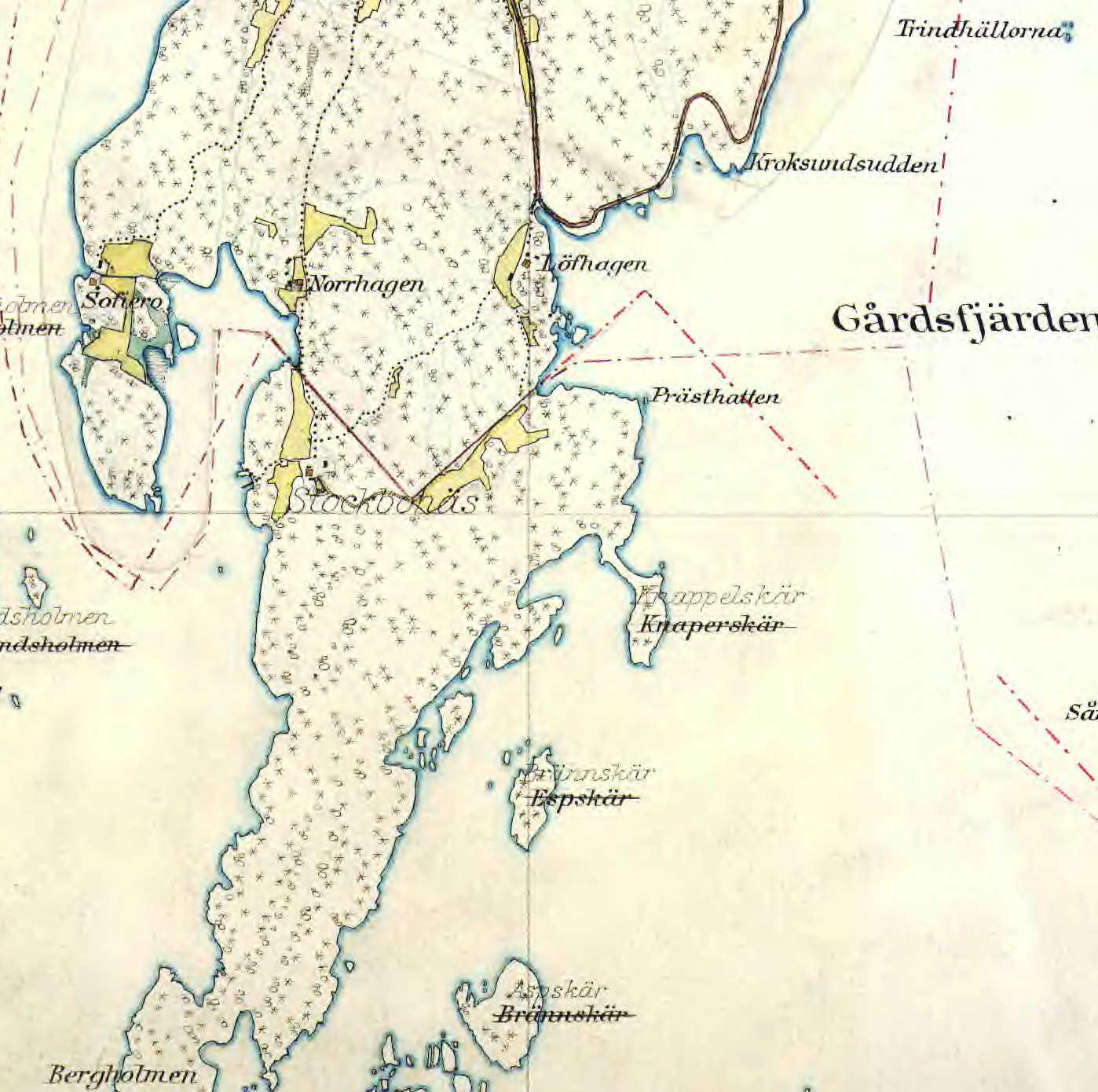 Lövhagenhalvön på Häradsekonomiska kartan